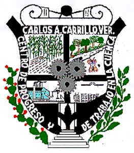 Escudo de Carlos A. Carrillo.